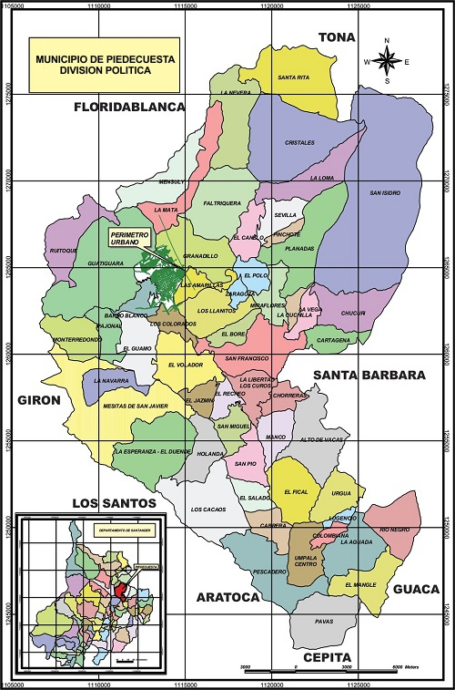 VEREDAS